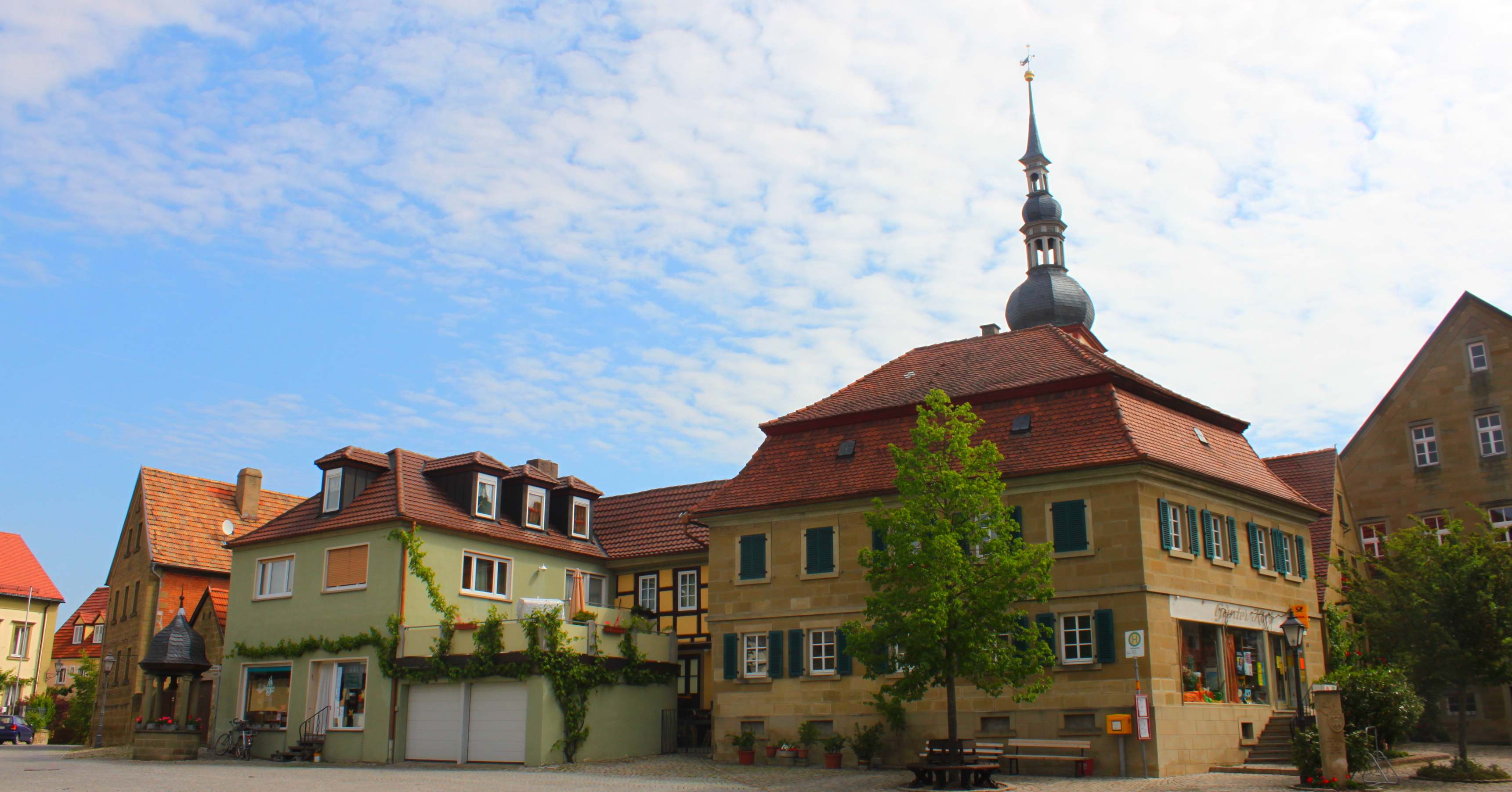 Die Ortsmitte von Abtswind